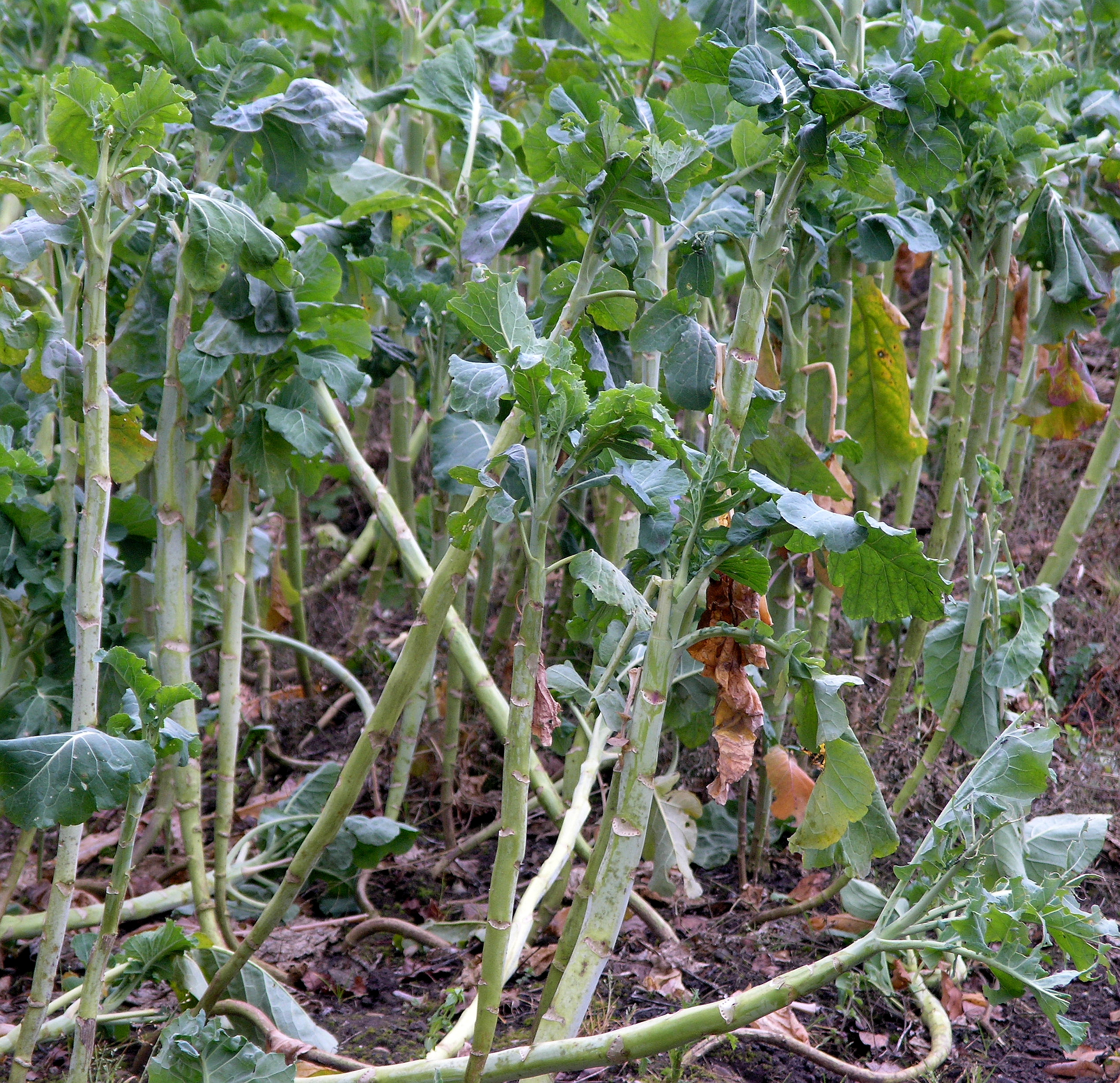 Beet mit Markstammkohl beerntet Herbst